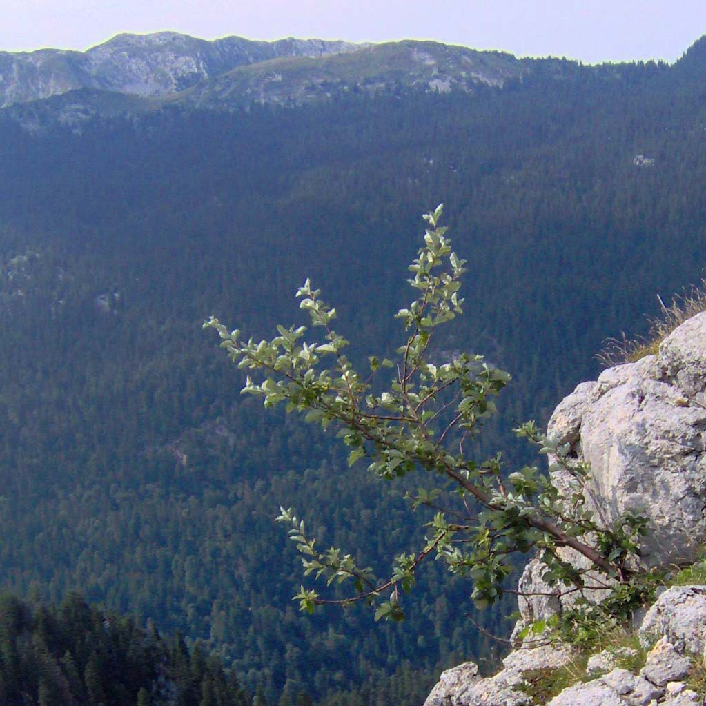 Image représentant un arbuste (Sorbus aria) qui pousse en milieu hostile. Il représente pour moi la résilience du peuple kabyle. Cette photo a été prise en Kabylie. En arrière plan, on aperçoit le massif du Djurdjura.